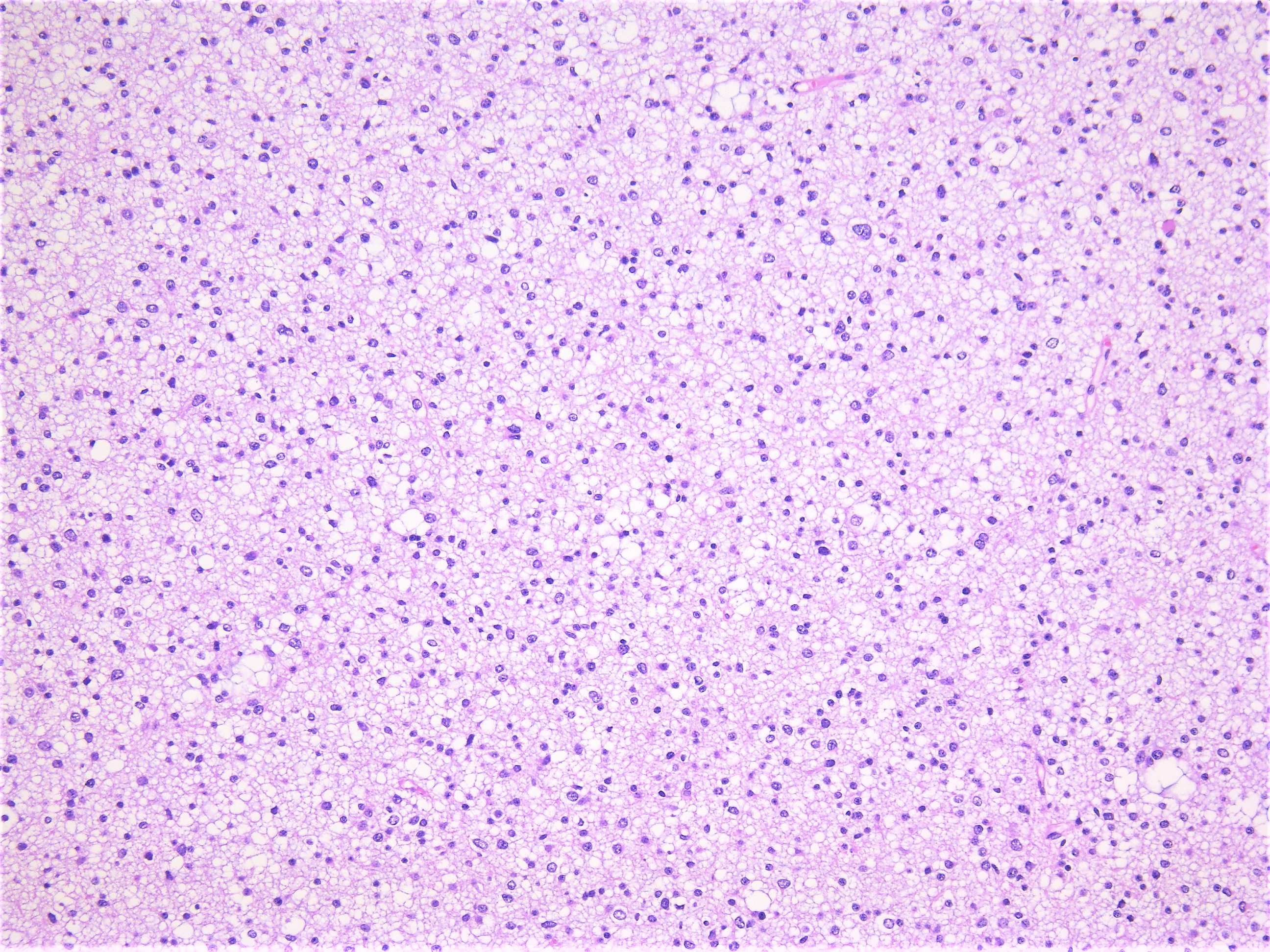 diffuse astrocytoma WHO grade IIライカMC170HDによる撮影